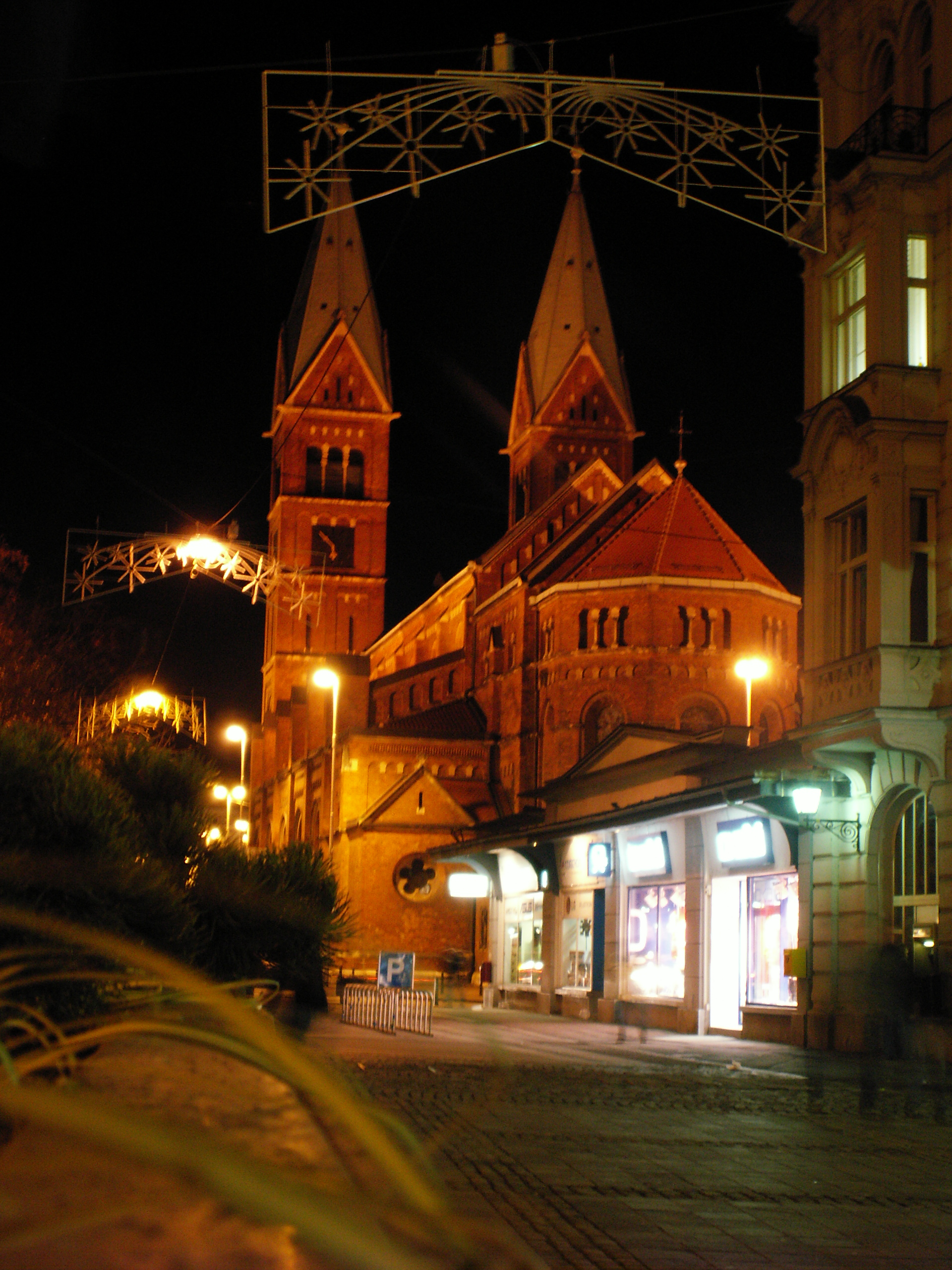 Frančiškanska cerkev nocą